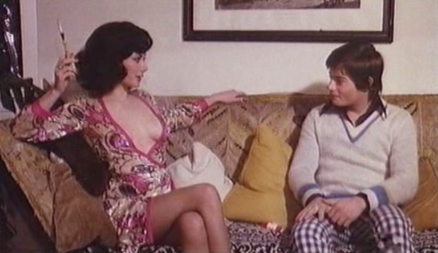 Screenshot del film Grazie... nonna di Marino Girolami (1975)